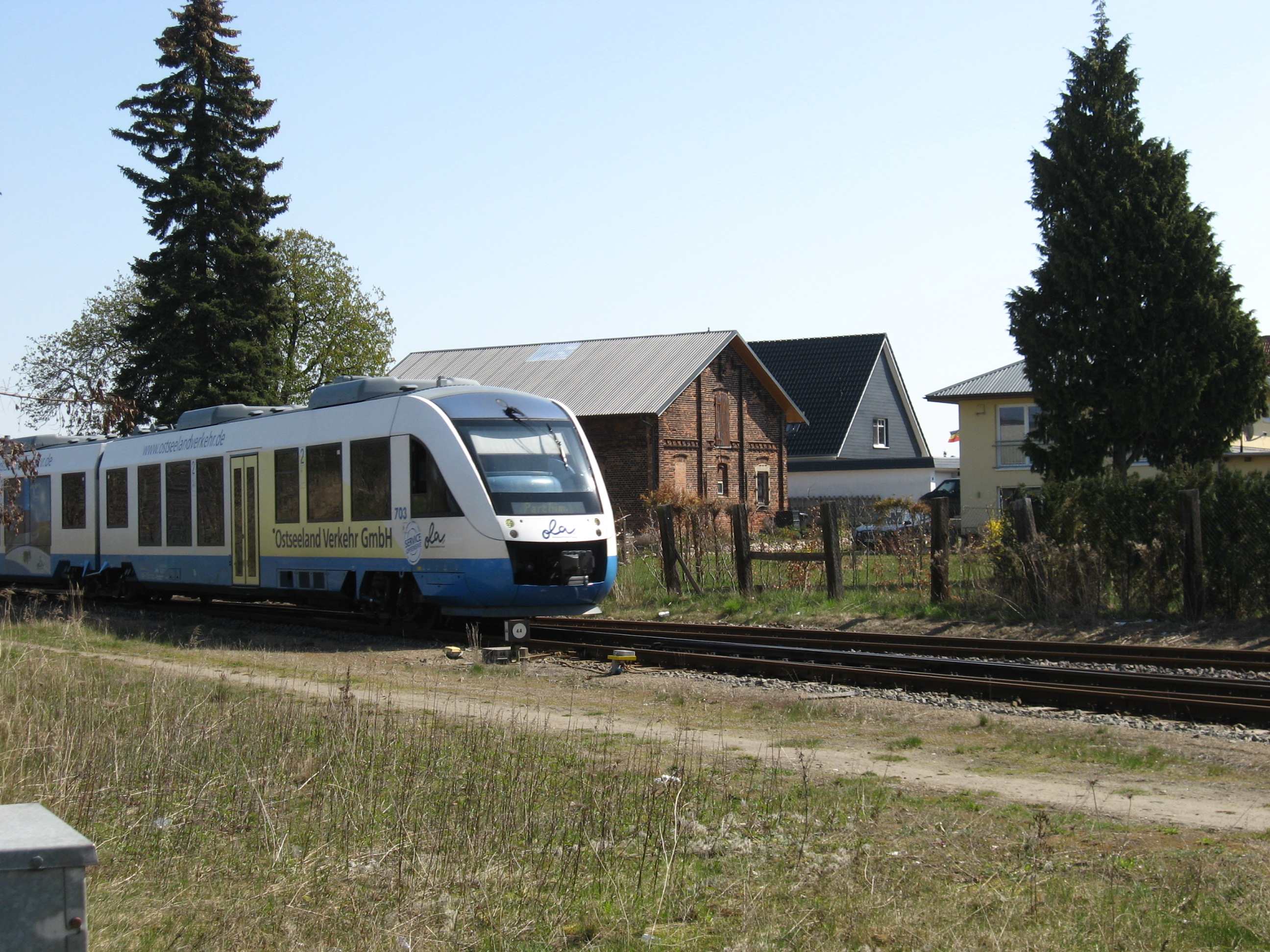 Lokale trein in Parchim station